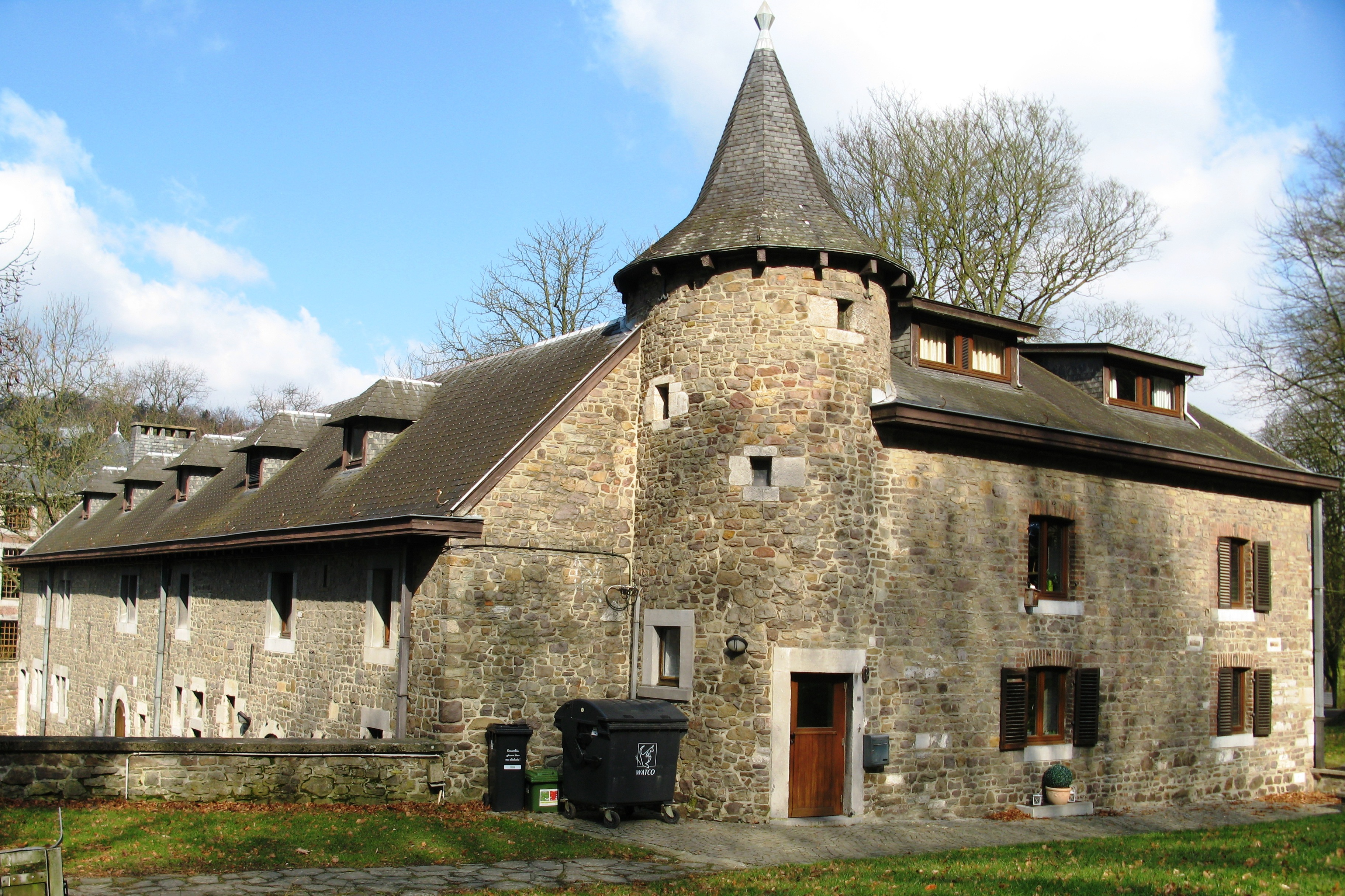 D'Jugenherberg zu Tilff.